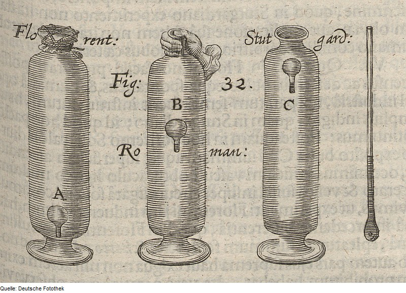 Original image description from the Deutsche Fotothek Physik & Messgerät & Dichte & Gas